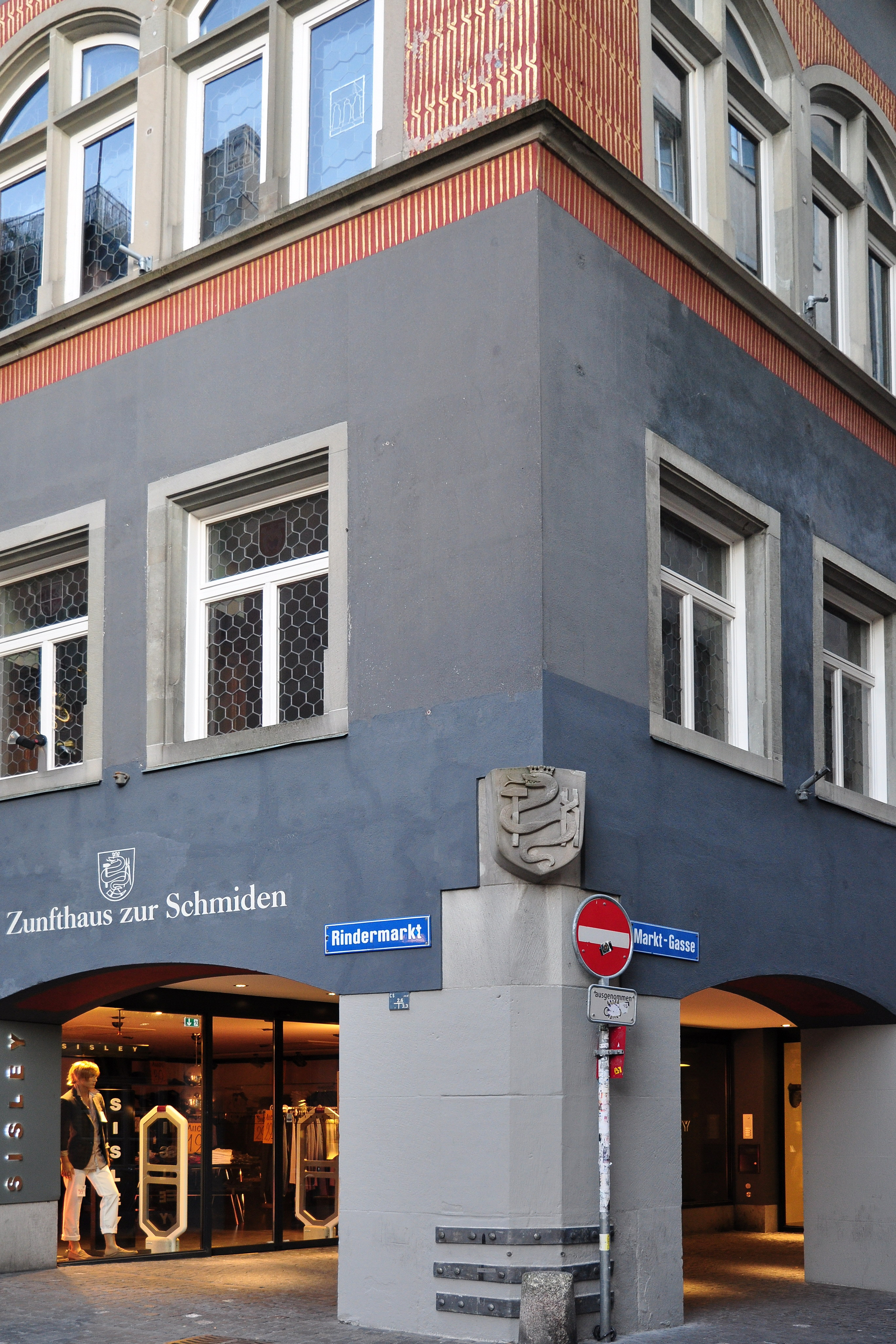 Zunfthaus «zur Schmiden», Zürich-Niederdorf (Switzerland)